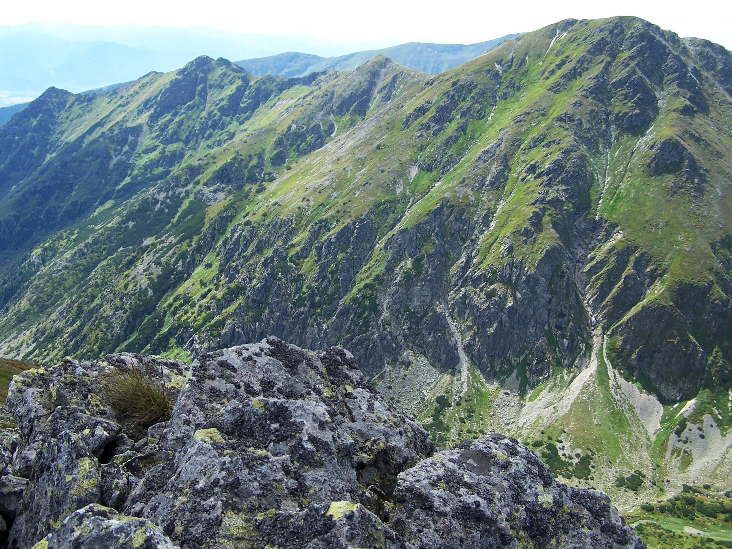 Raczkowa Czuba(Tatra Mountains )